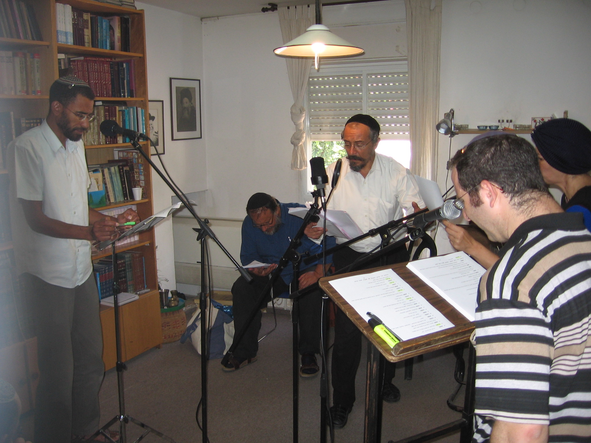 תיאטרון אודיו אבות האומה